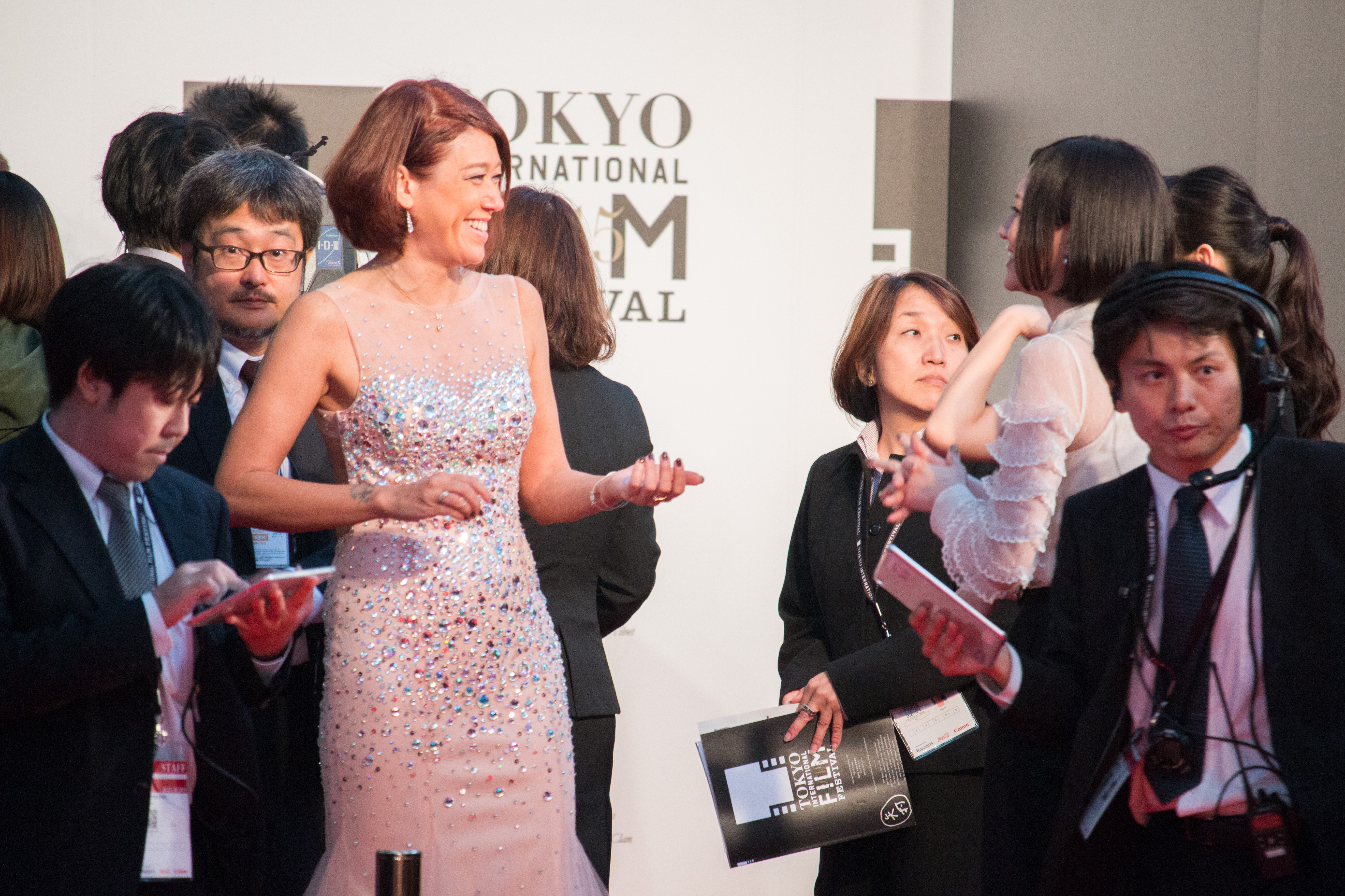 第28回 東京国際映画祭 オープニングセレモニー LiLiCo Perfume